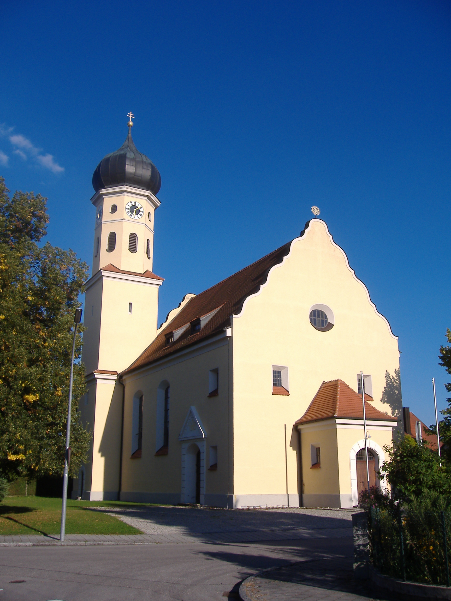 Die Marienkirche im Ingolstädter Stadtteil Hundszell